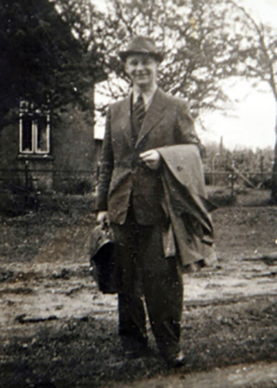 Richard Ohlhoff gründete Nortex im Jahr 1937 in Hamburg.